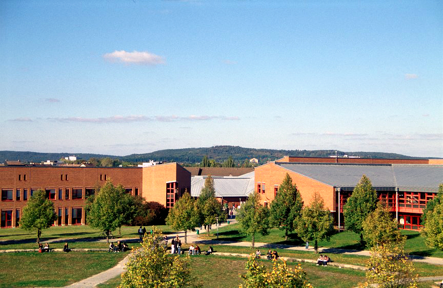 Campus der Universität Bayreuth. Links: Geisteswissenschaften (GW I), Mitte: Mensa, Rechts: Bibliothek.